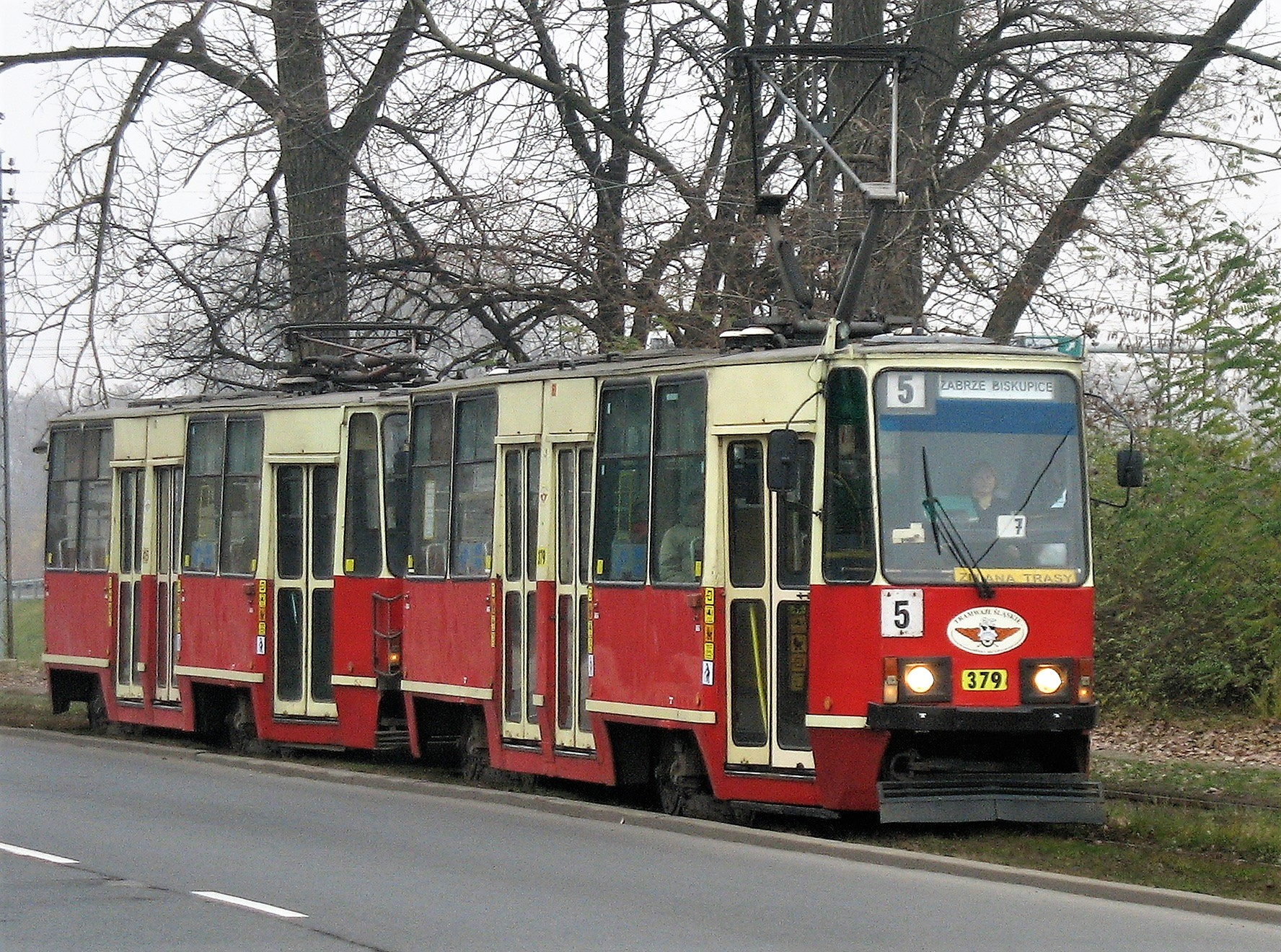 Zabrze, ulica Wolności. Tramwaj Konstal 105Na (numer 379) linii numer 5.